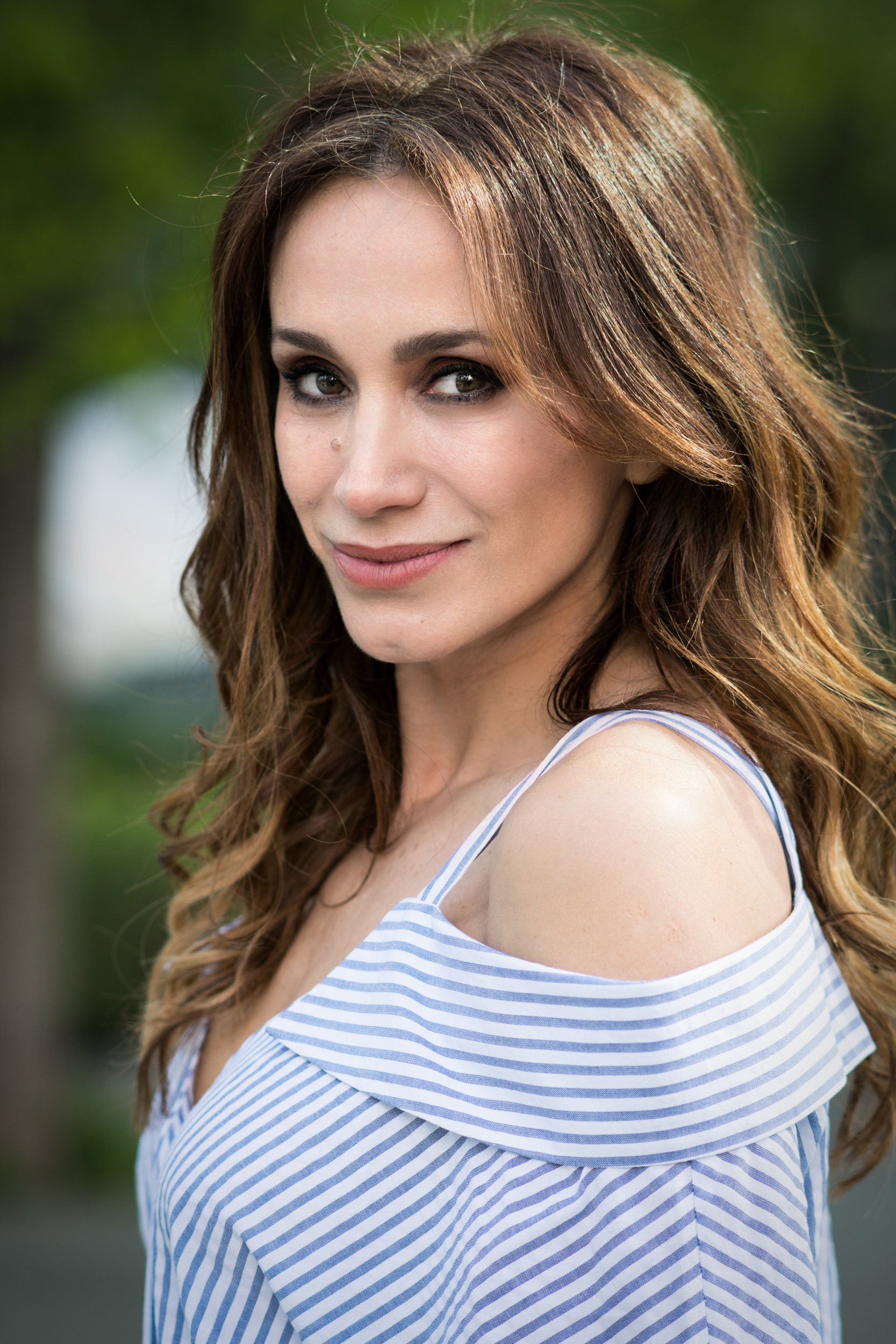 Alejandra Fosalba en 2017